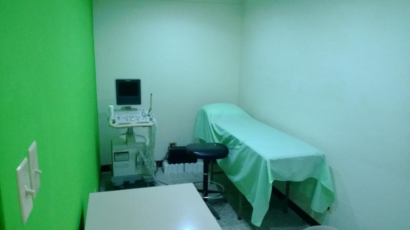 Área de servicio hospitalario ultrasonido